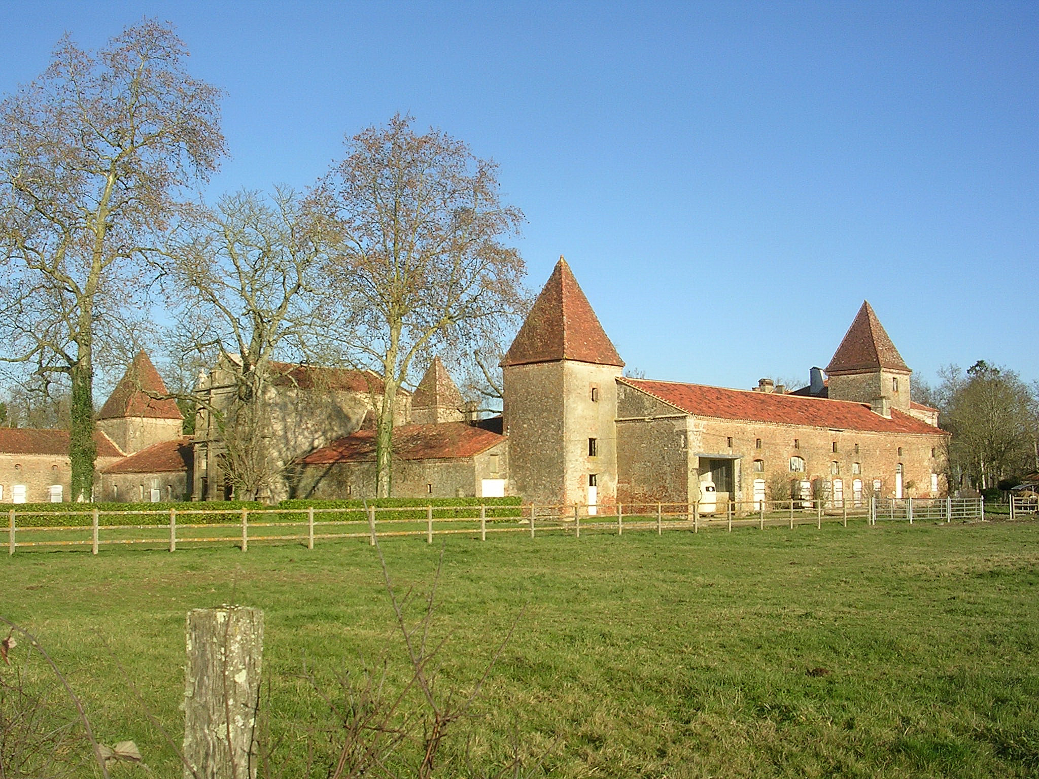 Abbaye Saint-Jean de la Castelle, à Duhort-Bachen (Landes, France)